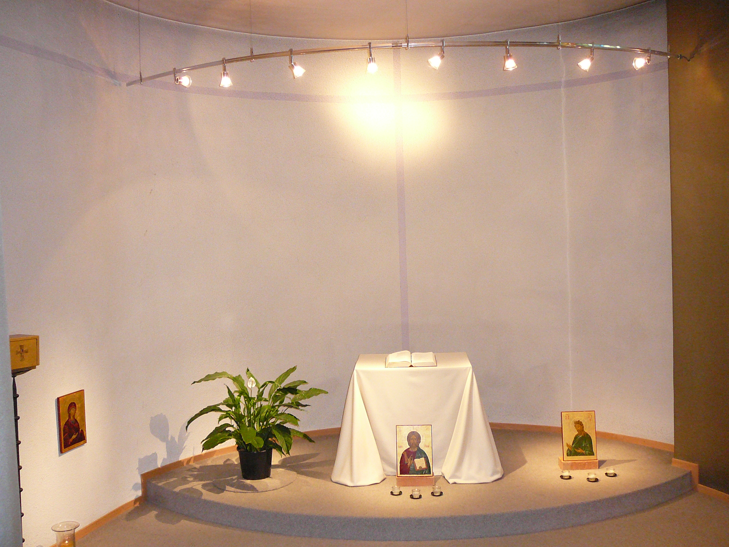 Römisch-katholische Kirche Sainte Famille in Zürich, Krypta